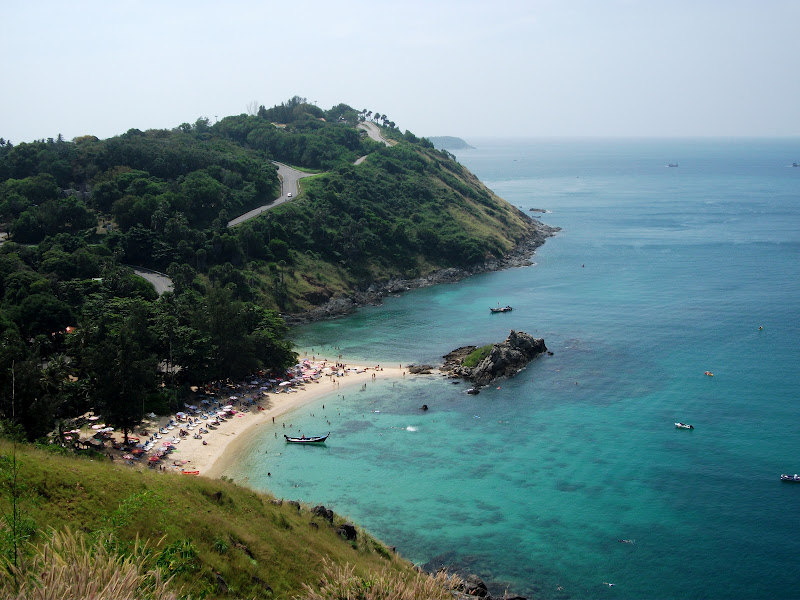 Phuket Nai Harn Plaji